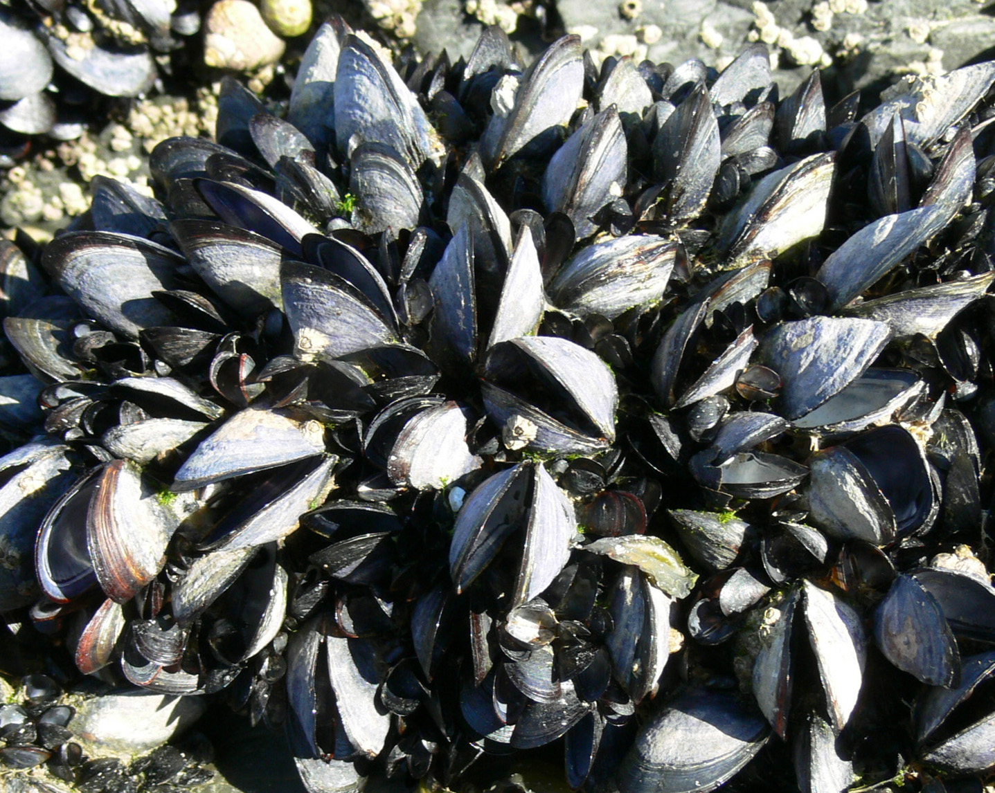 Moules mortes, sur un long rocher où toutes les moules sont mortes (victimes d'un pathogène vraissemblablement, plutôt que d'un polluant car les autres rochers sont restés couverts de moules vivantes) Lieu : Finistère, au nord du Cap de la Chèvre (Bretagne, Ouest de la France, Europe), dans une zone où des efflorescences de plancton rougeâtres ont été observées cette année là.. Juillet 2006